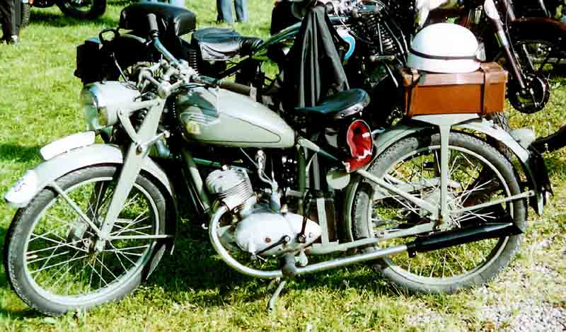 Ardie